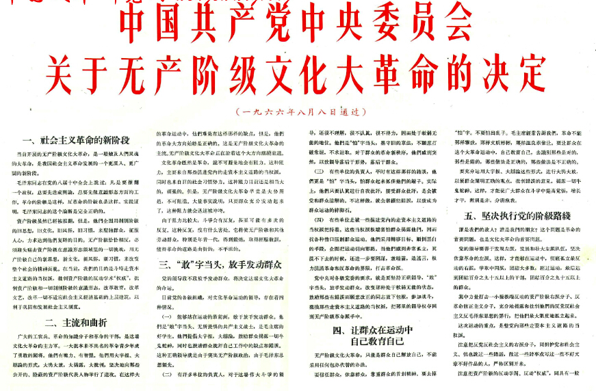 1966-09 1966年8月8日决定 文化大革命